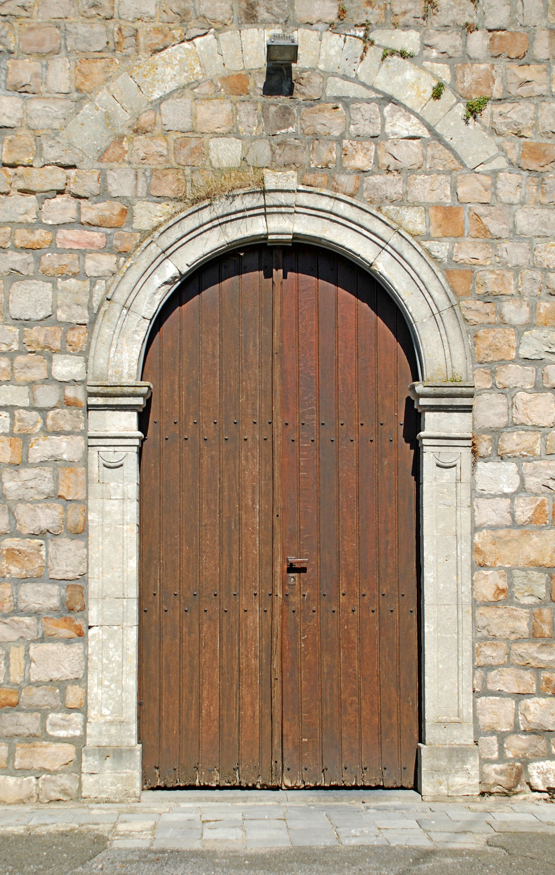 Belgique - Brabant wallon -Orp-le-Grand - Église Saint-Pierre de Jandrain